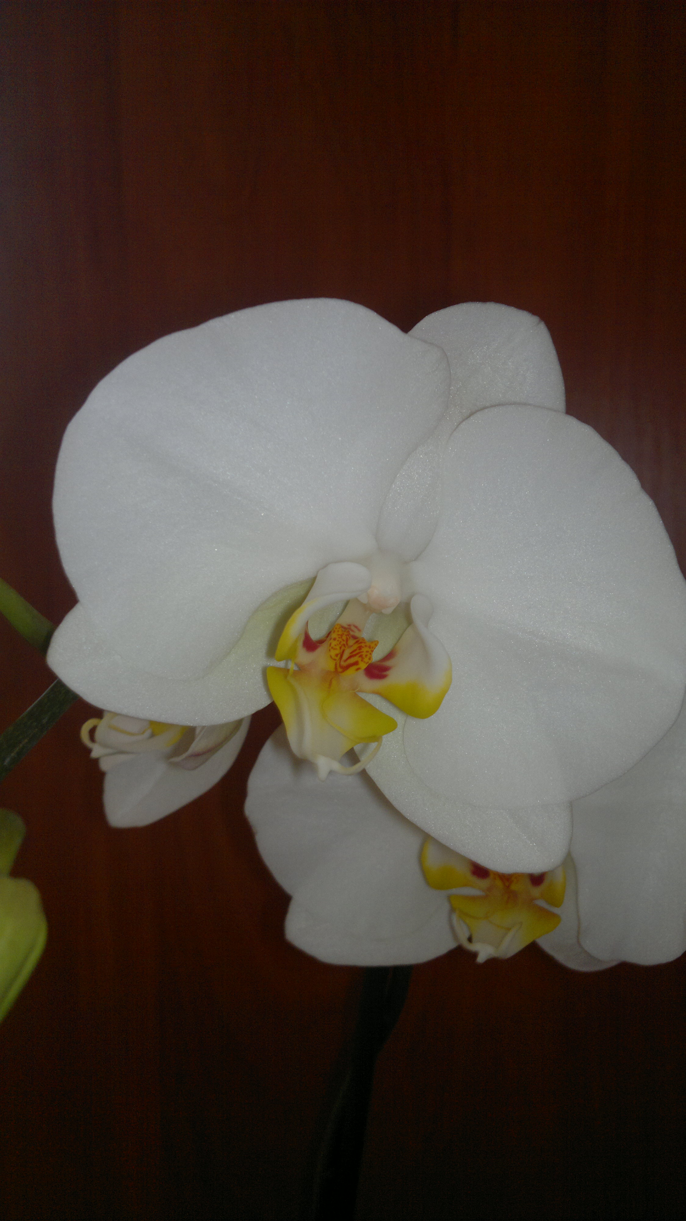 Bílý květ Phalaenopsis